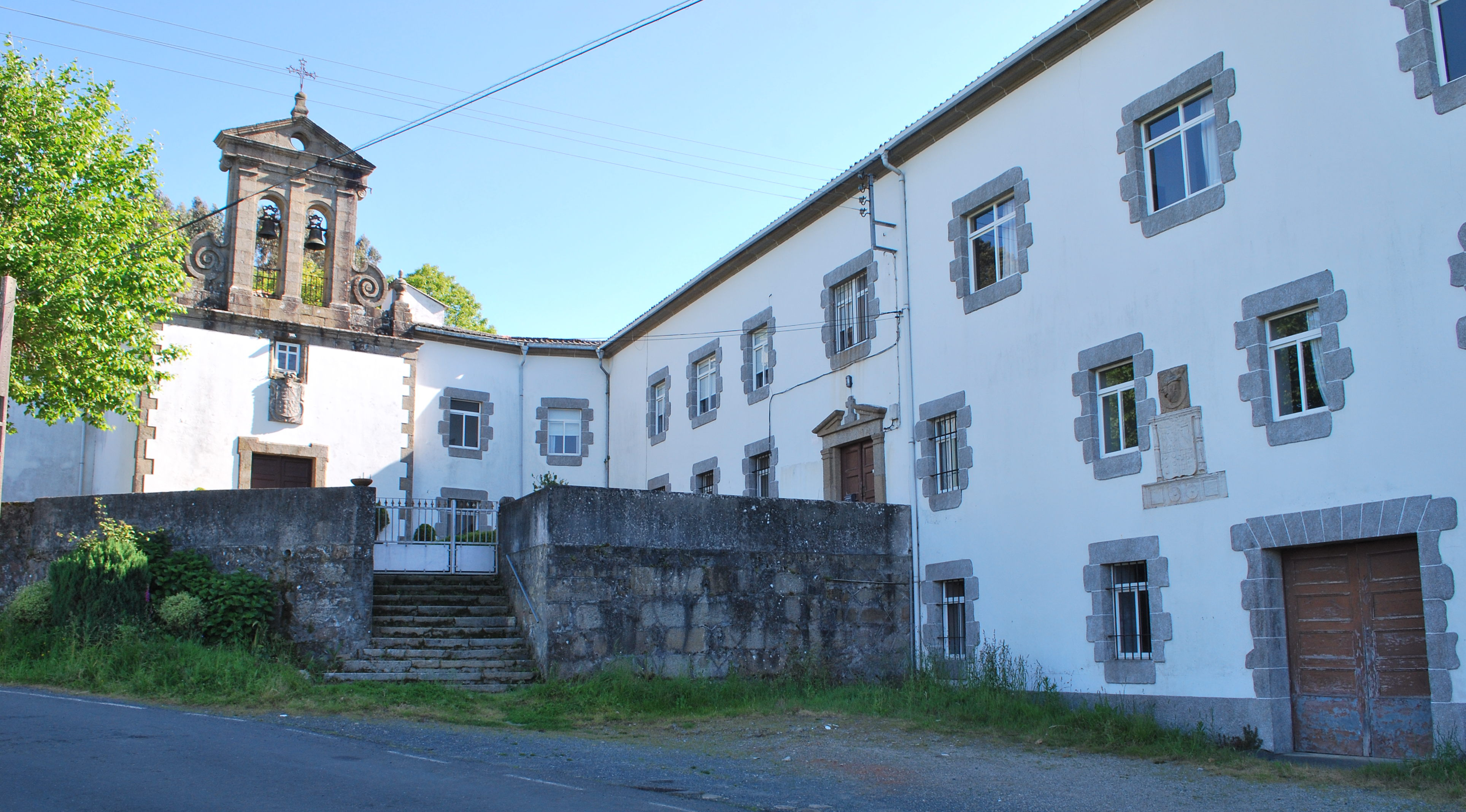 Vista do convento de Baltar no Val, Narón